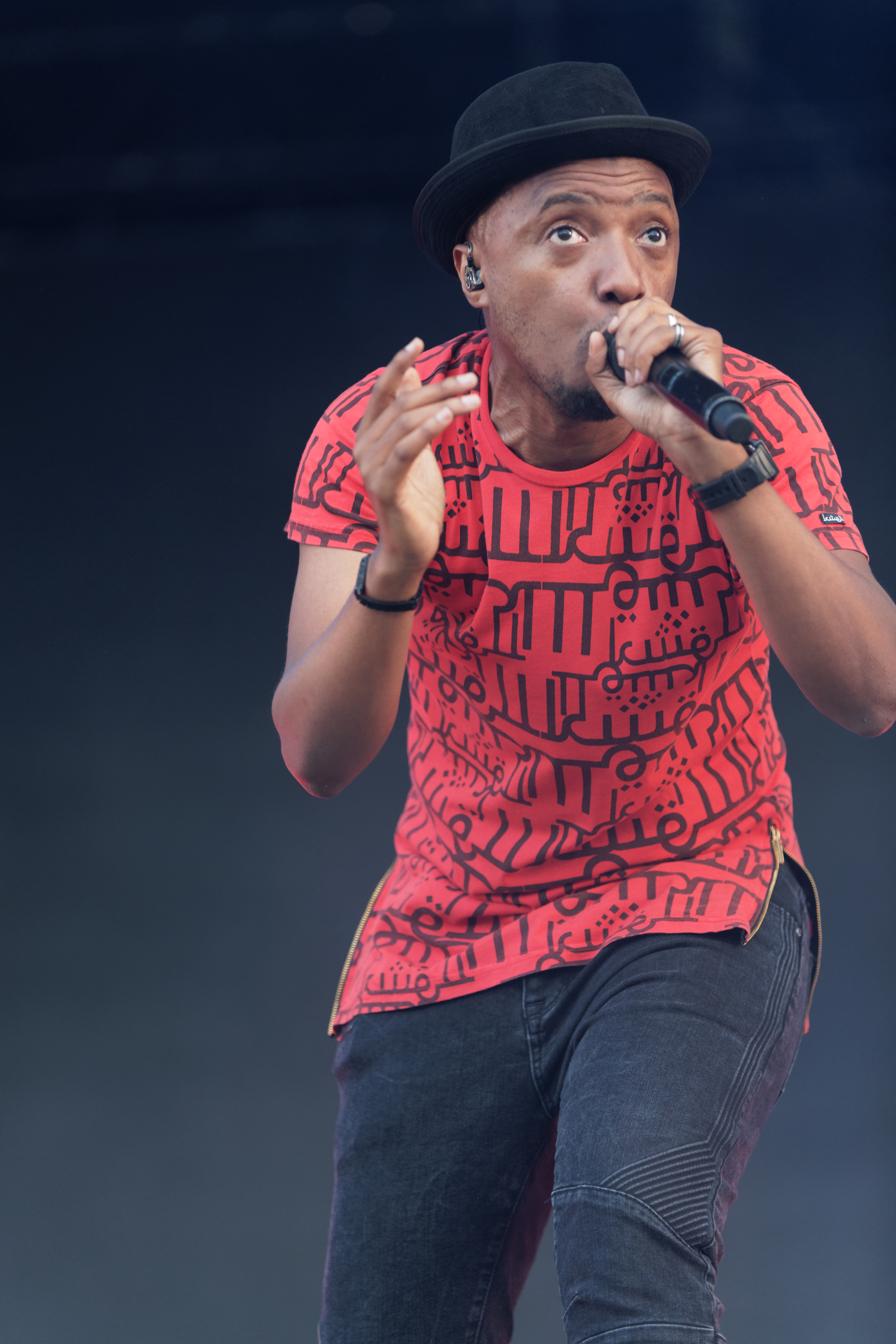 Le festival des vieilles charrues 2015.